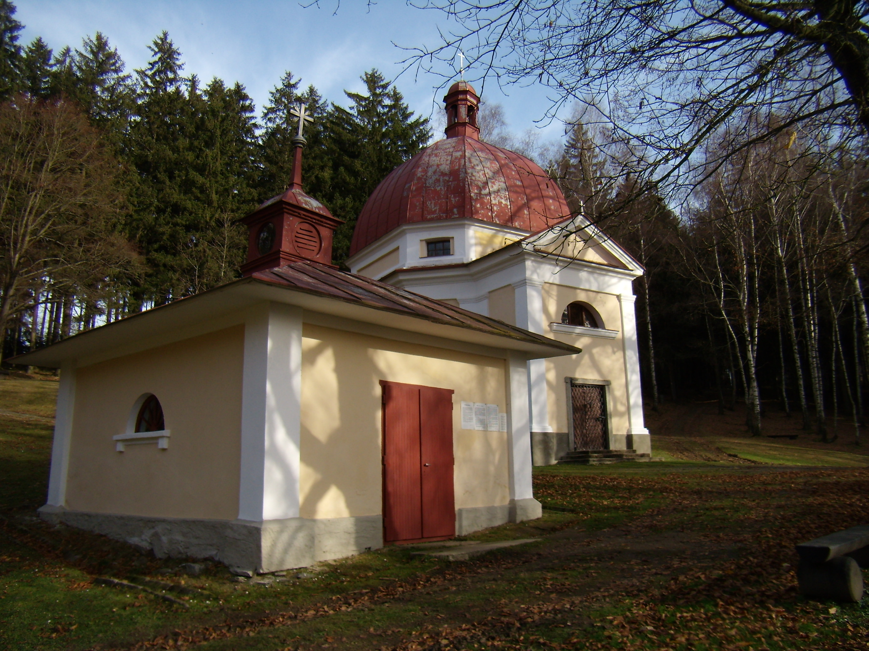 Dobrá Voda - poutní kaple Panny Marie Bolestné date=2009-11-20 13:30:29